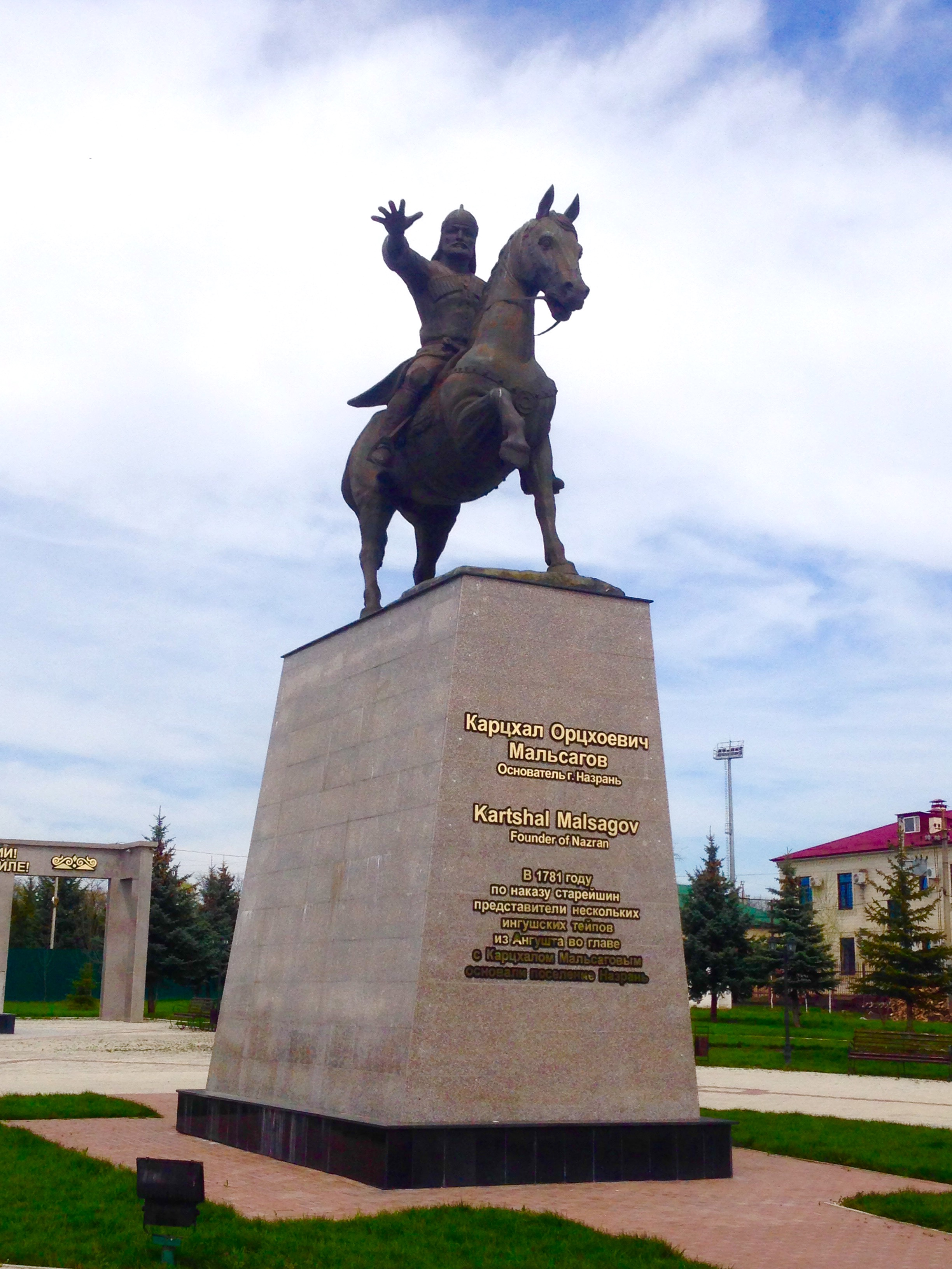 Памятник основателю Назрани - Карцхала Орцхоевичу Мальсагову.